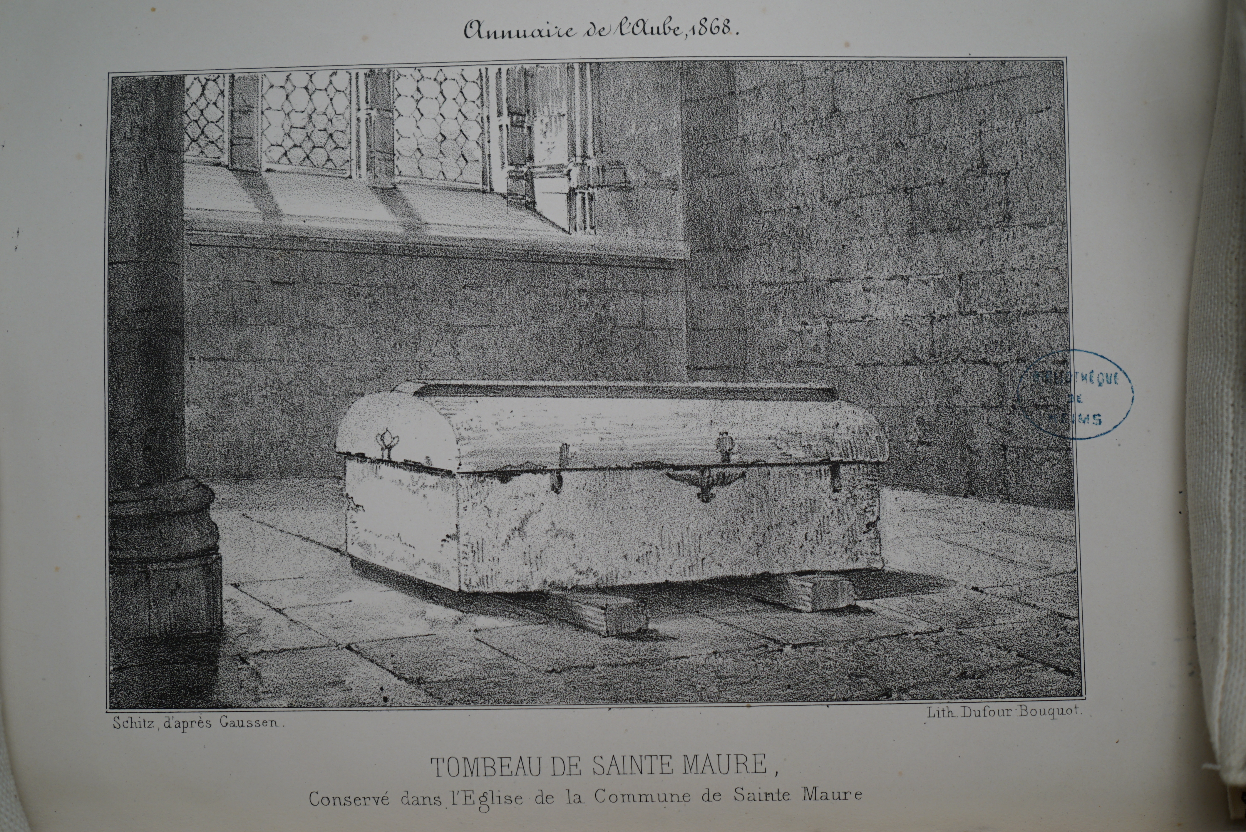 dessin du sarcophage in annuaire de l'aube de 1868.